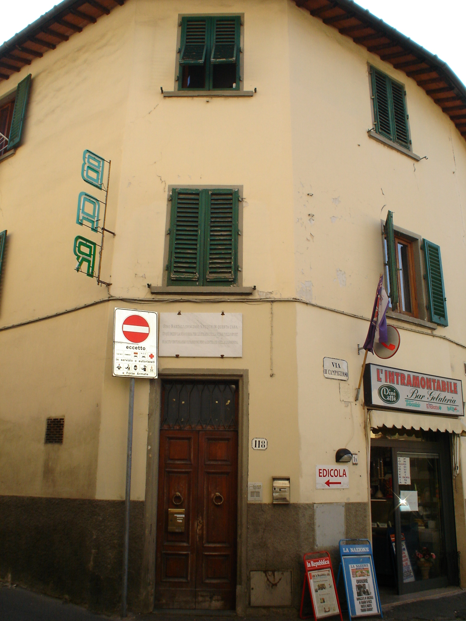 Casa Natale di Gino Bartali a Ponte a Ema (Firenze)